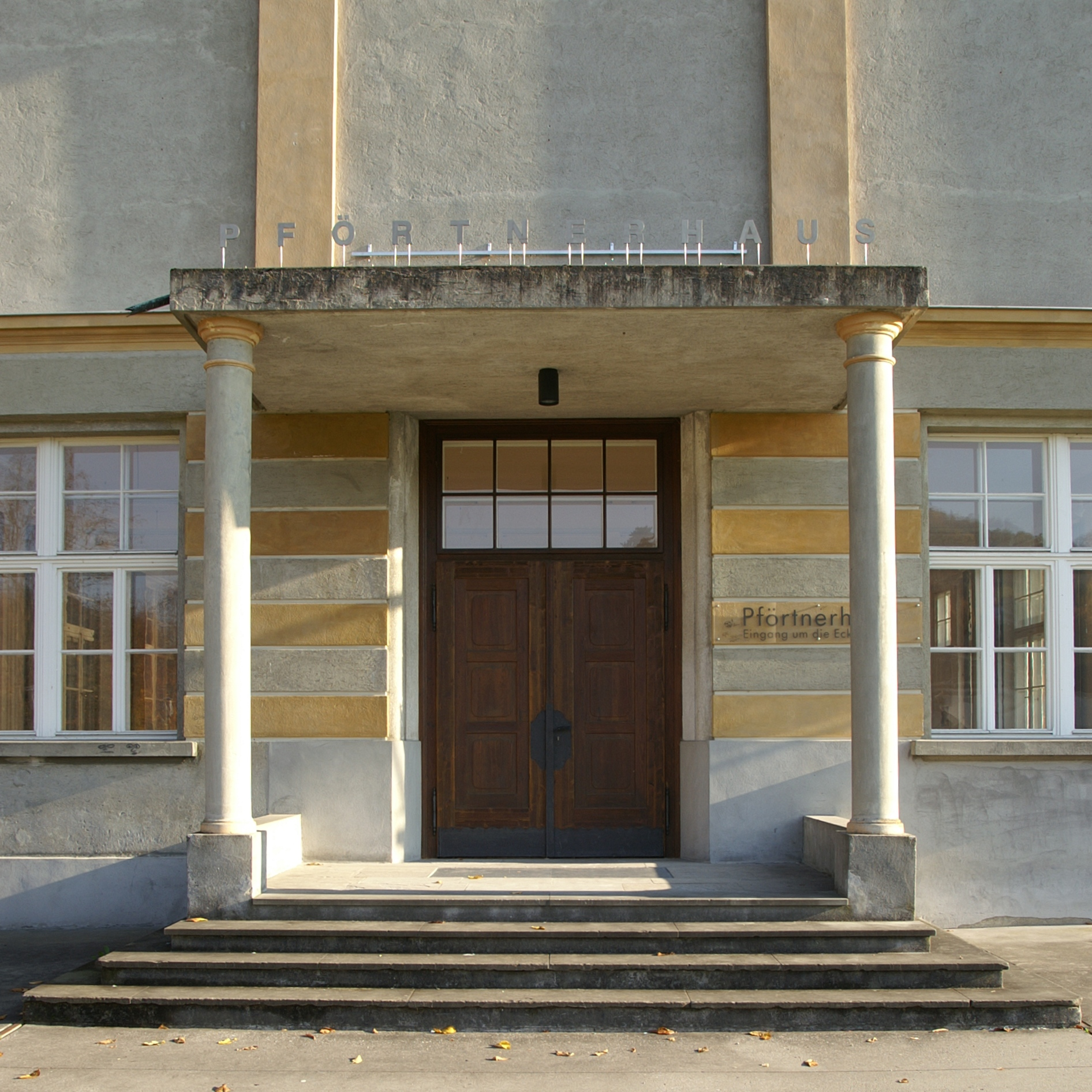 das Stella Matutina, heute Landeskonservatorium wurde 1899 durch Peter Hutter in Feldkirch, Vorarlberg erbaut.